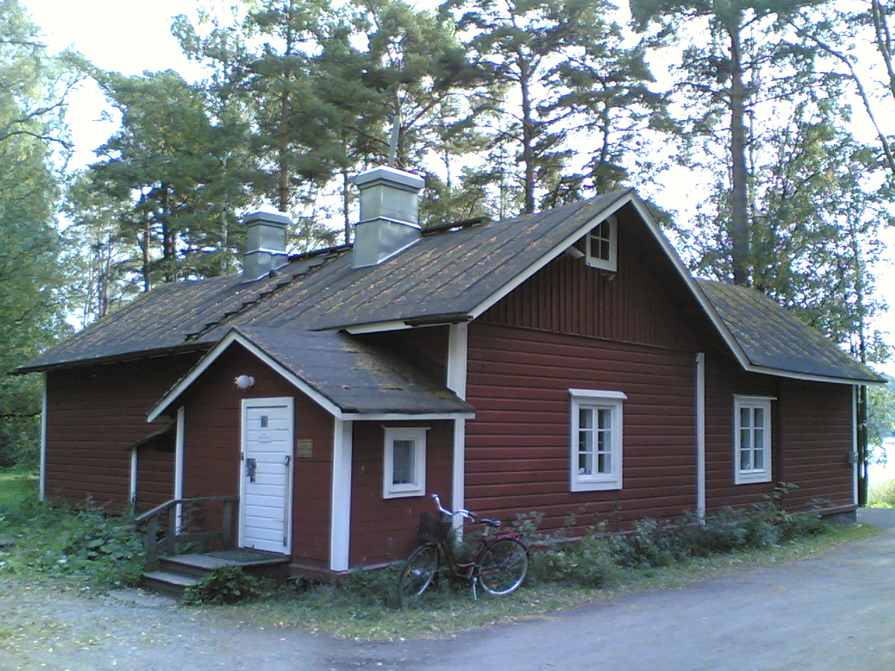 Kahvila Villa Ullas